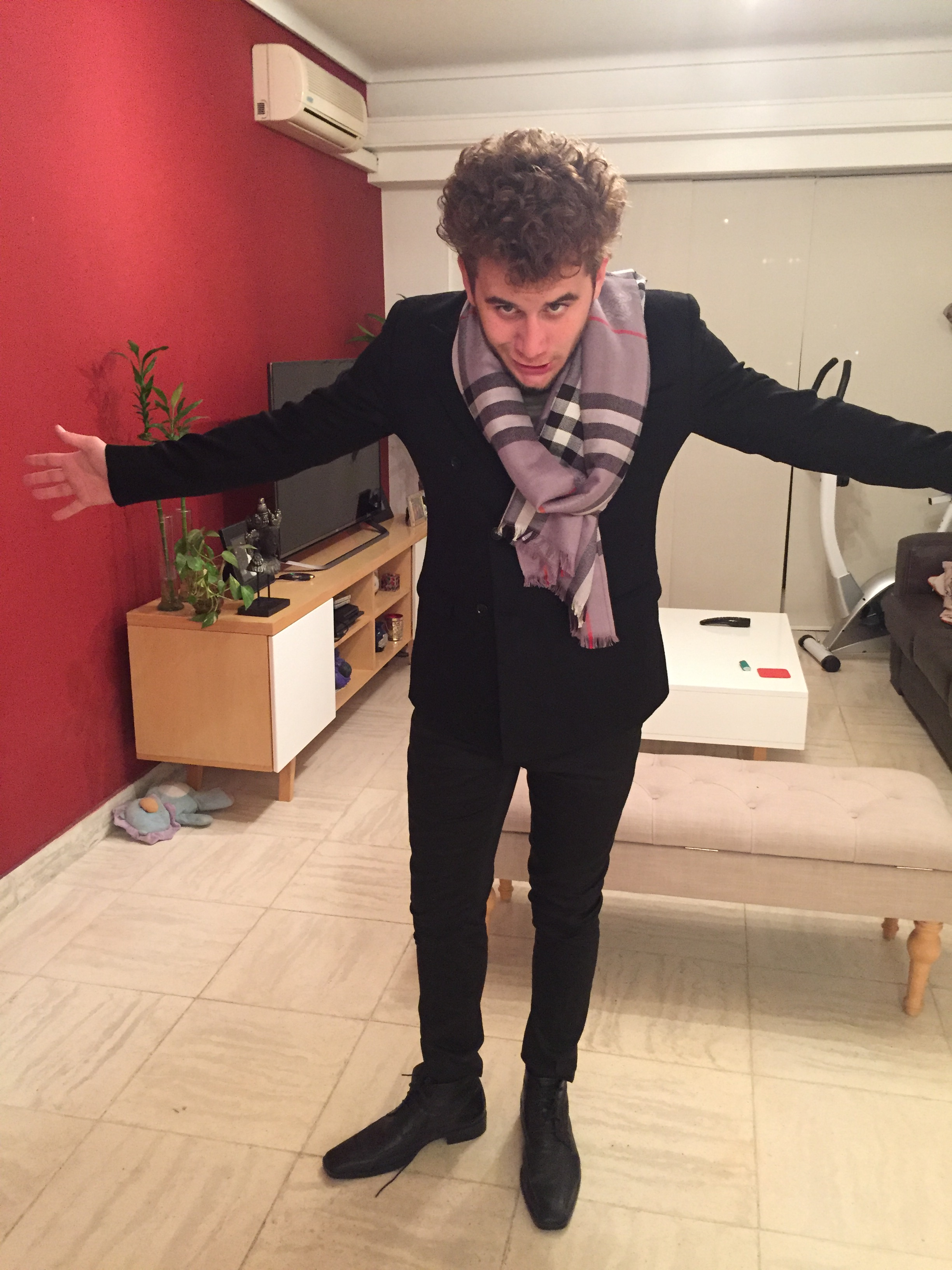 AgustinPardella2016.jpg